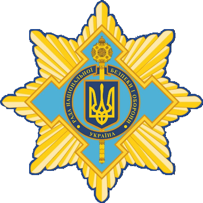 Знак Ради національної безпеки і оборони України